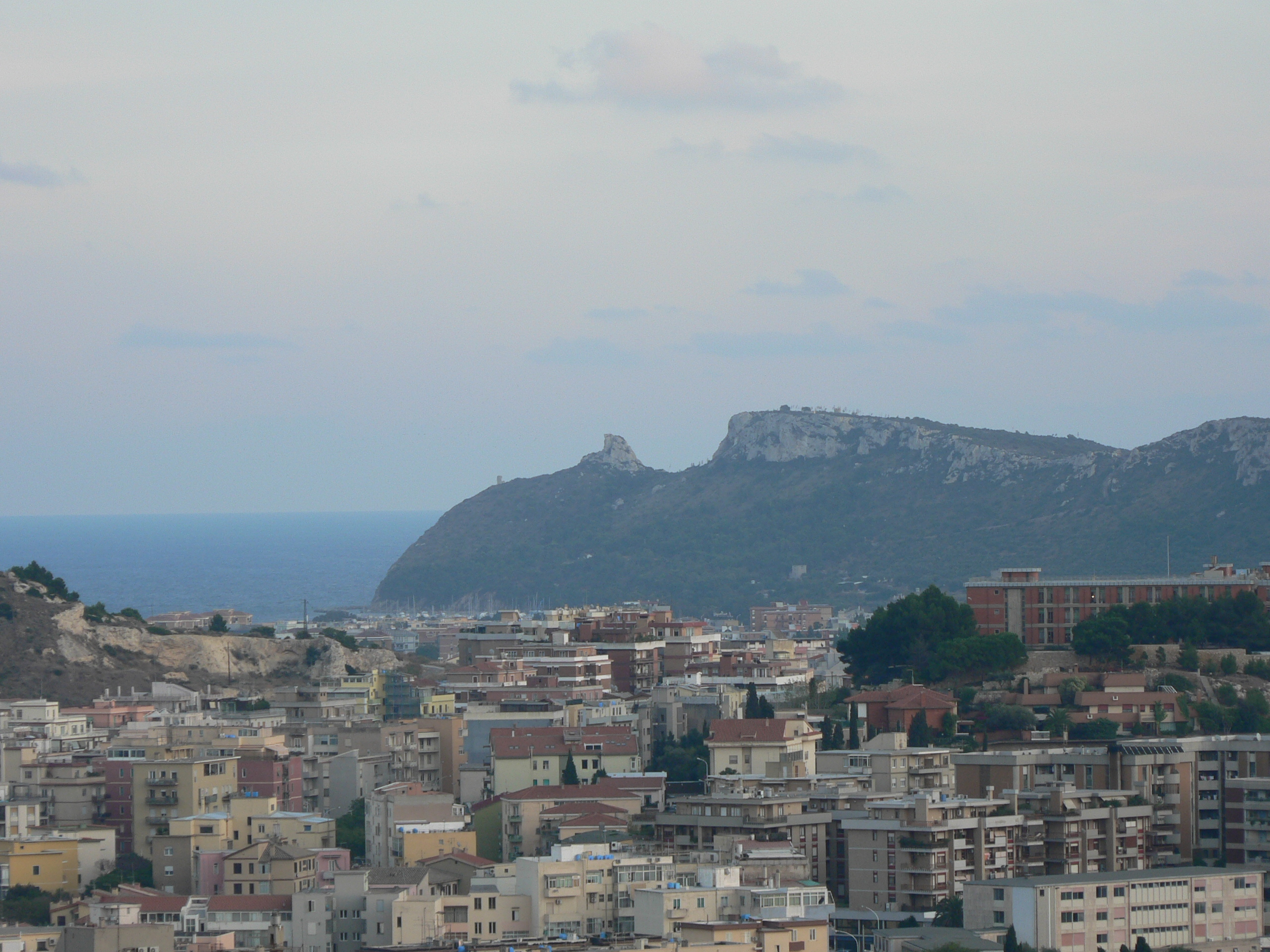 Cagliari, Sardegna, Italia